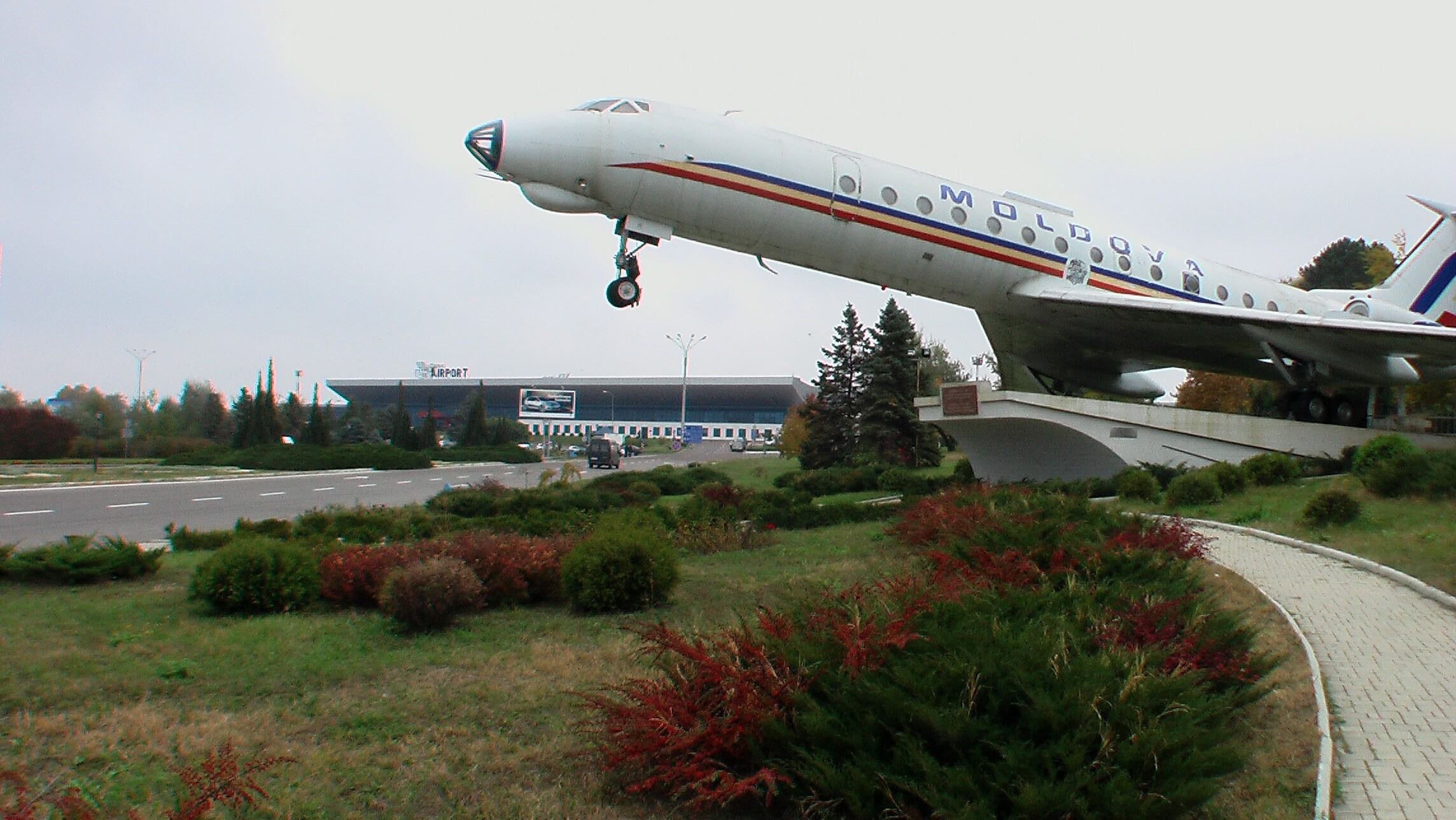 ChisinauFlughafen